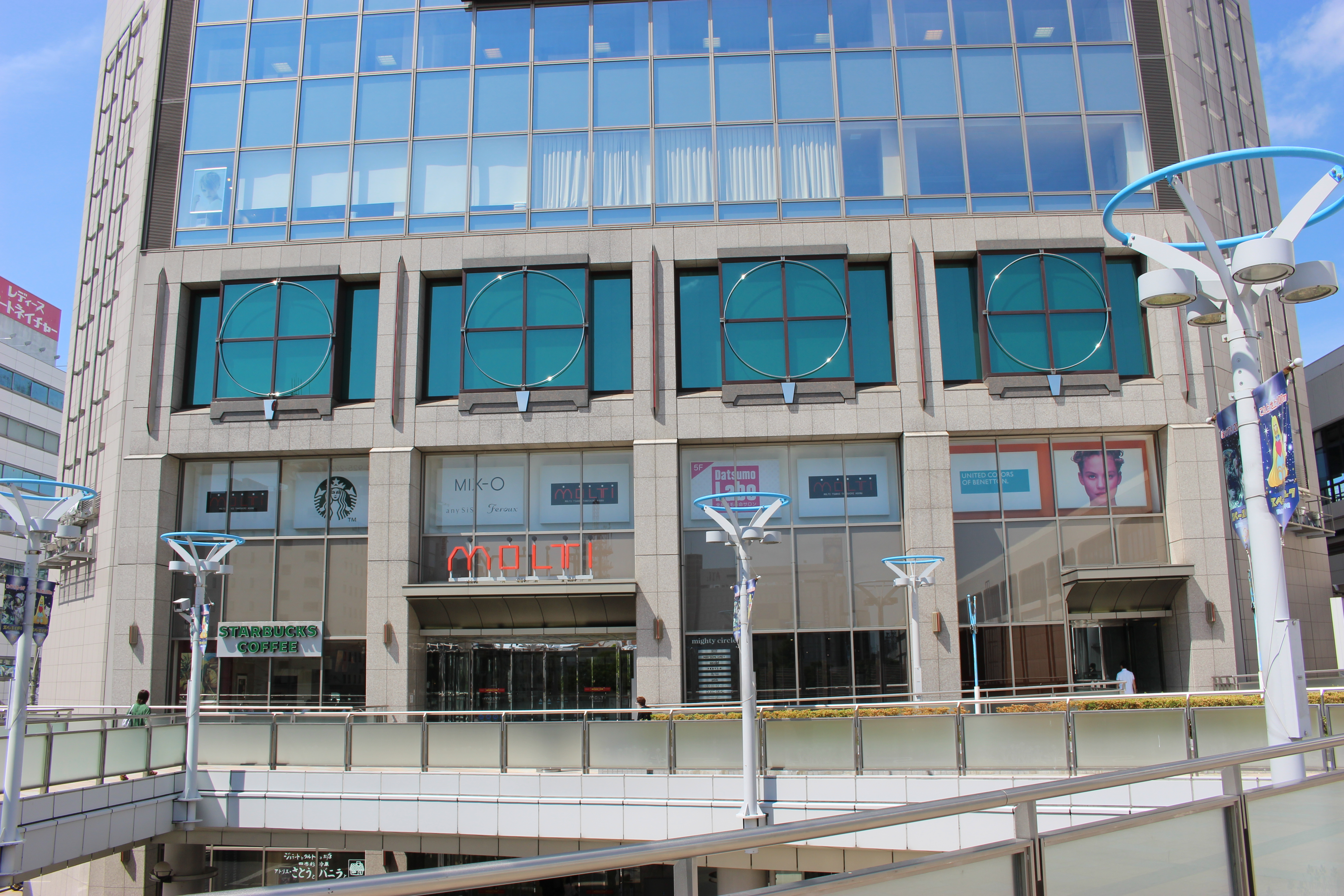 モルティ郡山